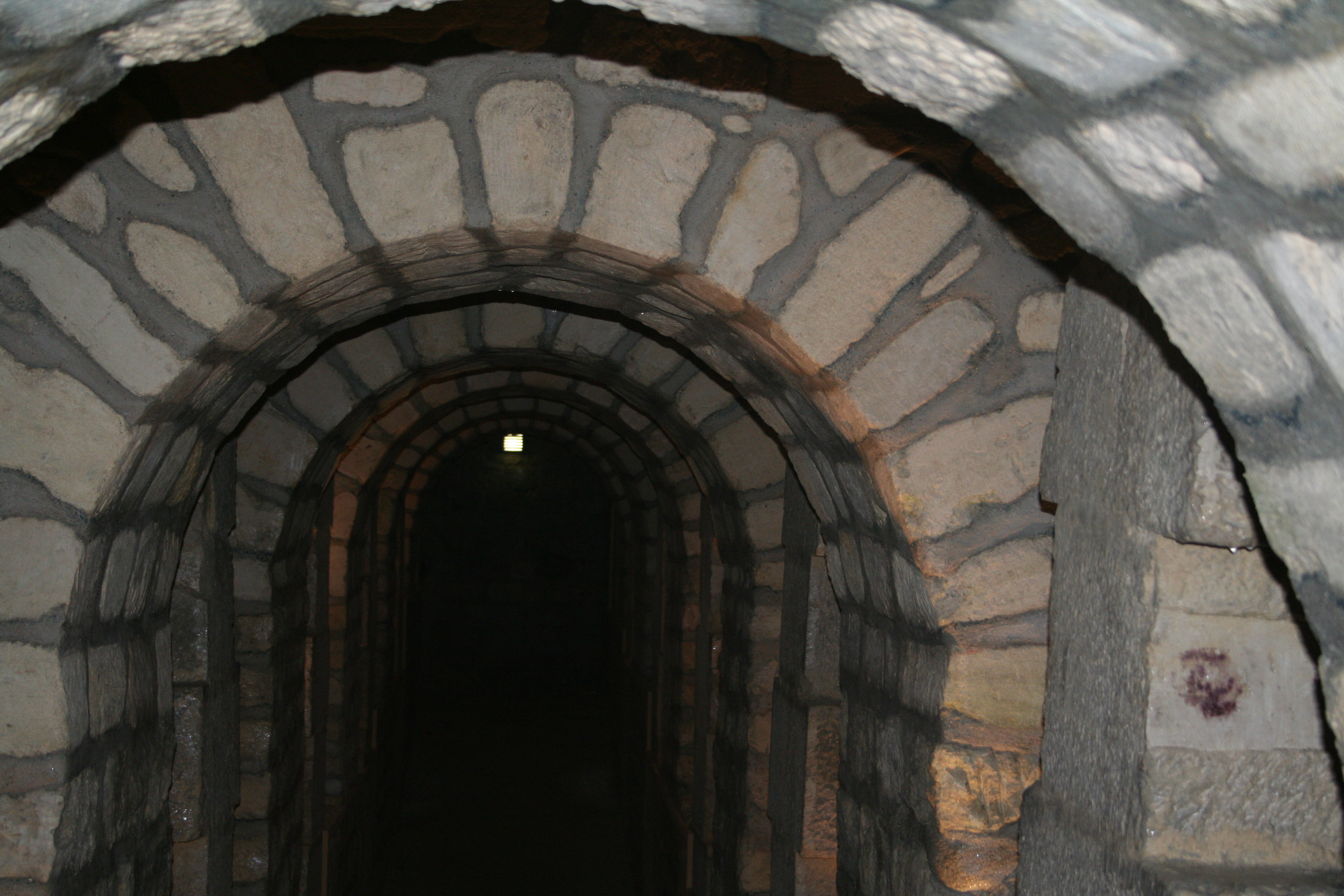 Катакомбите на Париж.